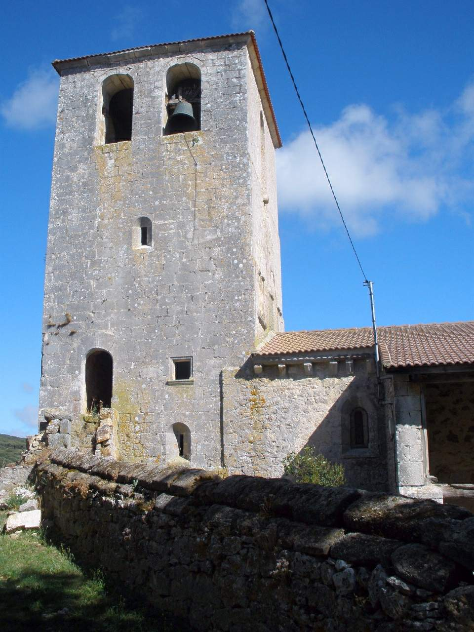 Iglesia de Santa Eulalia de La Rad (Burgos)